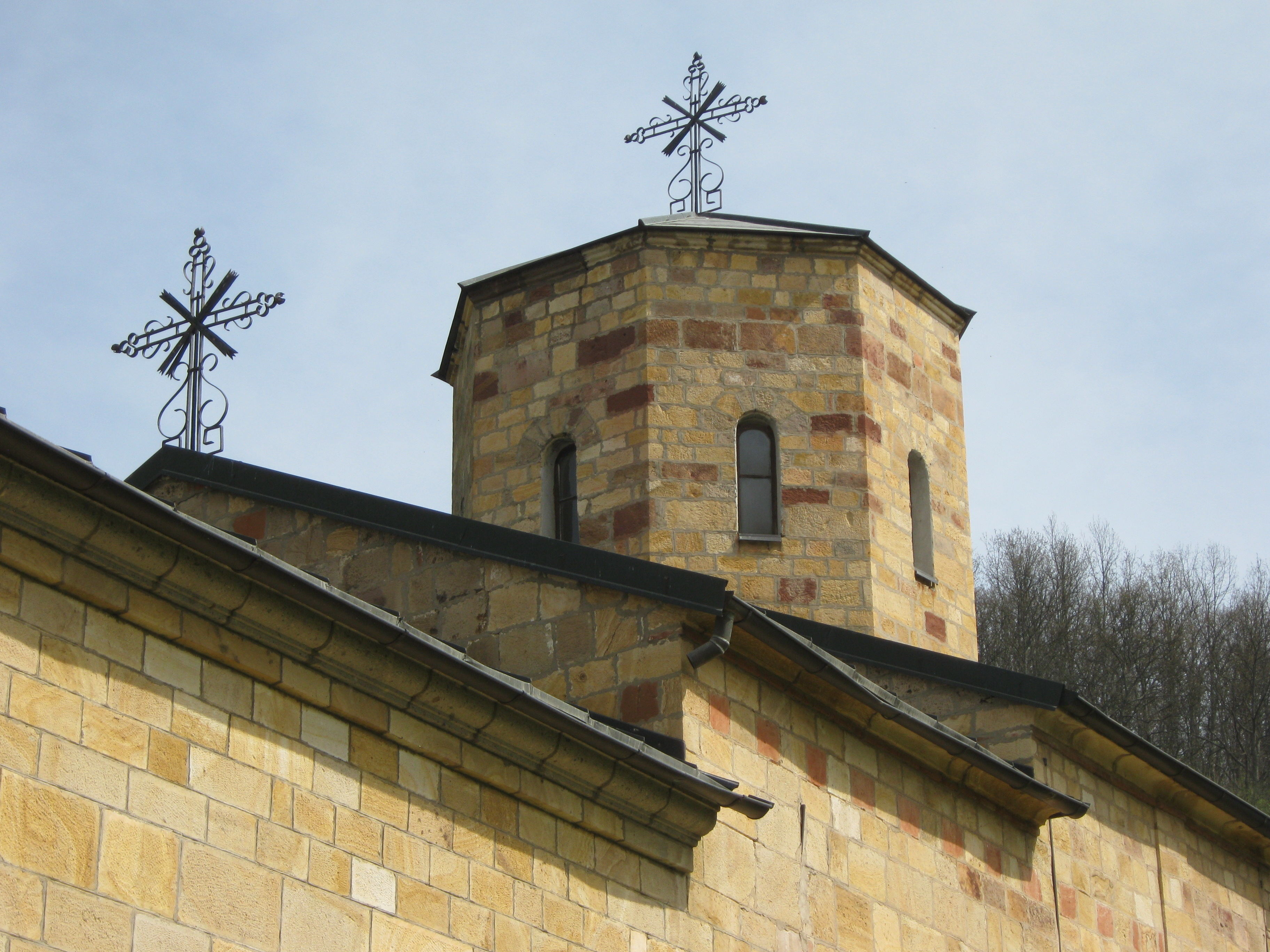 Detalji crkve Svetog Save na Savincu.